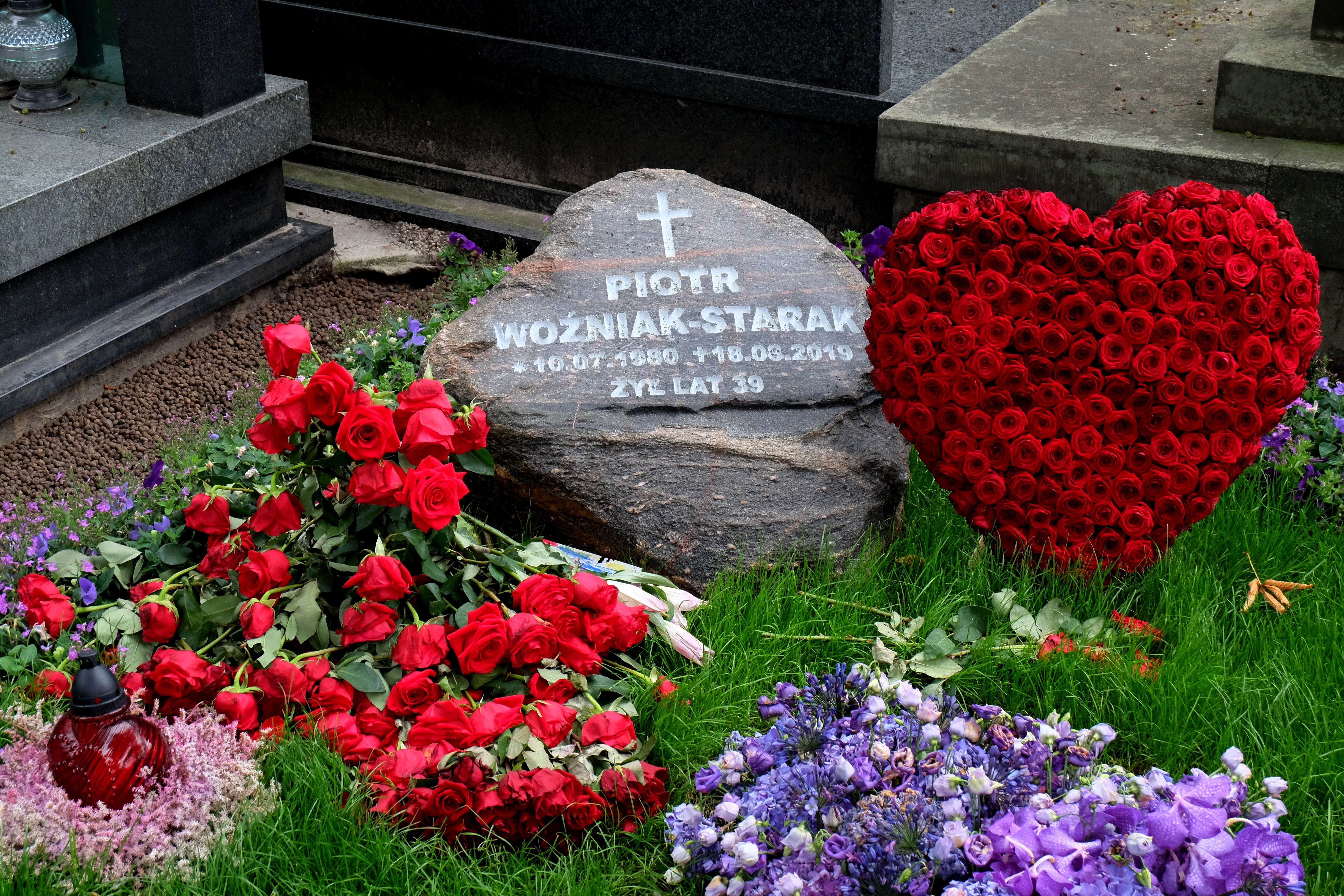 Grób producenta Piotra Woźniaka-Staraka na Cmentarzu Powązkowskim w Warszawie